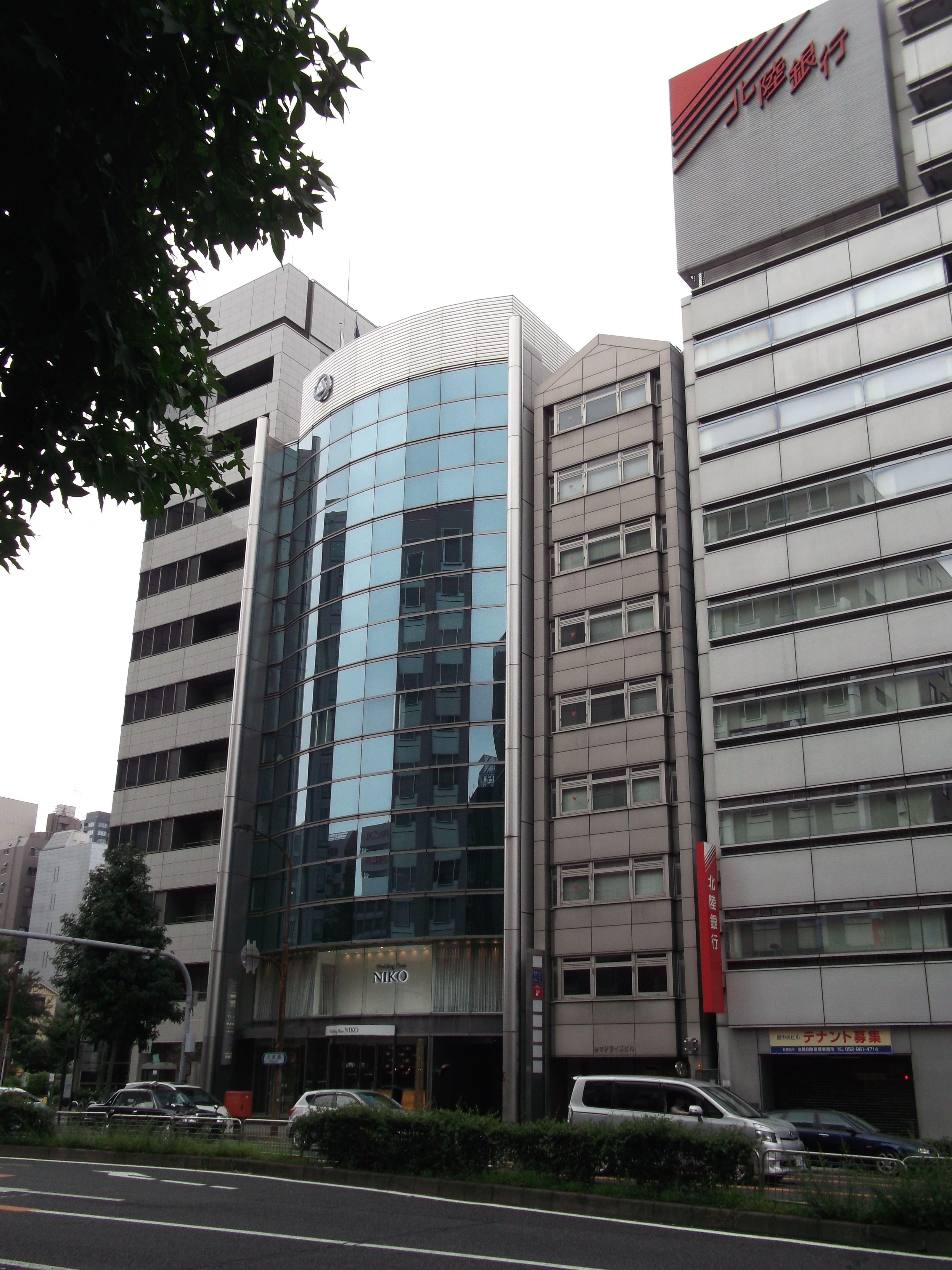 名古屋市中区錦三丁目の三晃錦ビルを西側公道南側より撮影